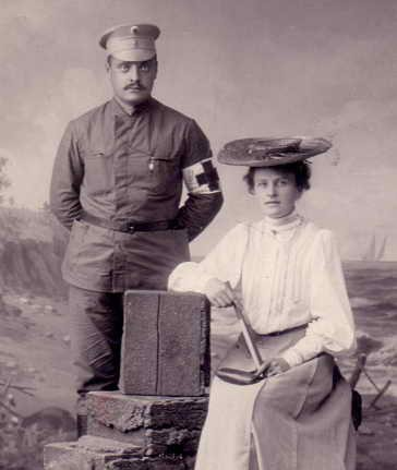 Яков Ильич Некрасов с женой Надеждой Максимовной. 1905г.